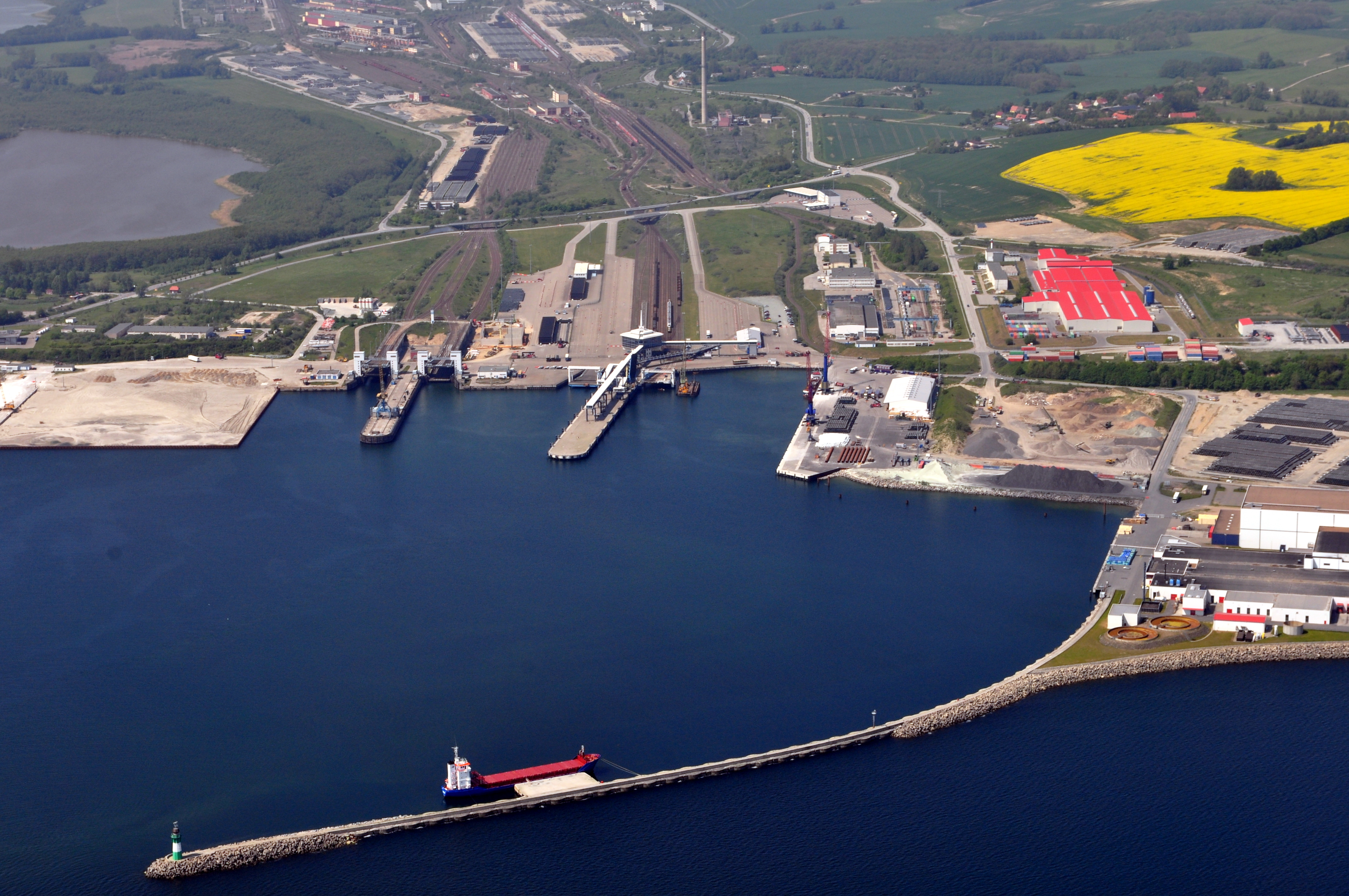 Die Bilder wurden von mir während eines einstündigen Rundflugs ab Flugplatz Güttin am 21. Mai 2011 aufgenommen. Die Bildbeschreibung steht im Dateinamen. Aufgenommen mit einer Nikon D5000 durch das Seitenfenster des Flugzeugs.